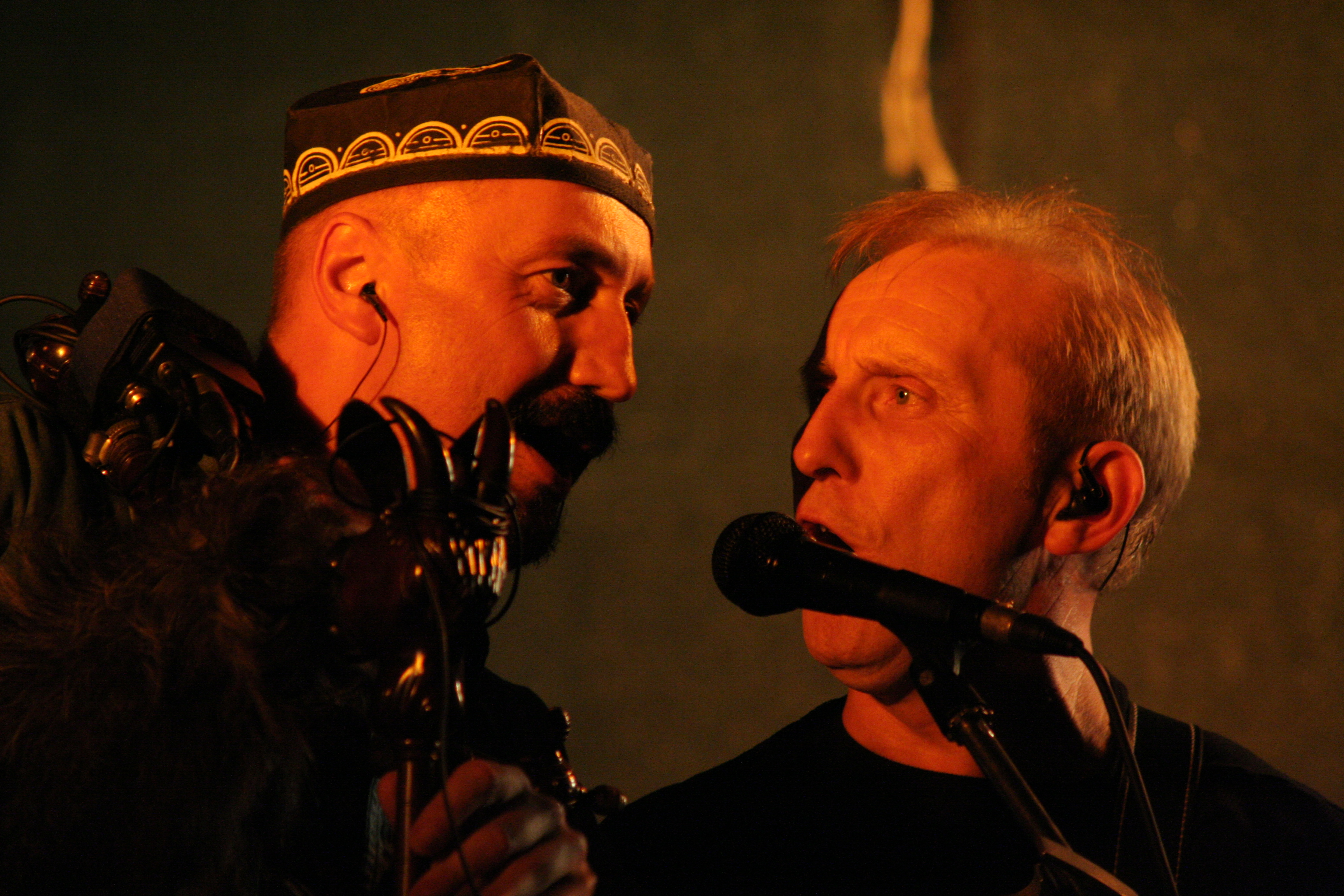 Michal Pavlík and František Černý, Čechomor concert